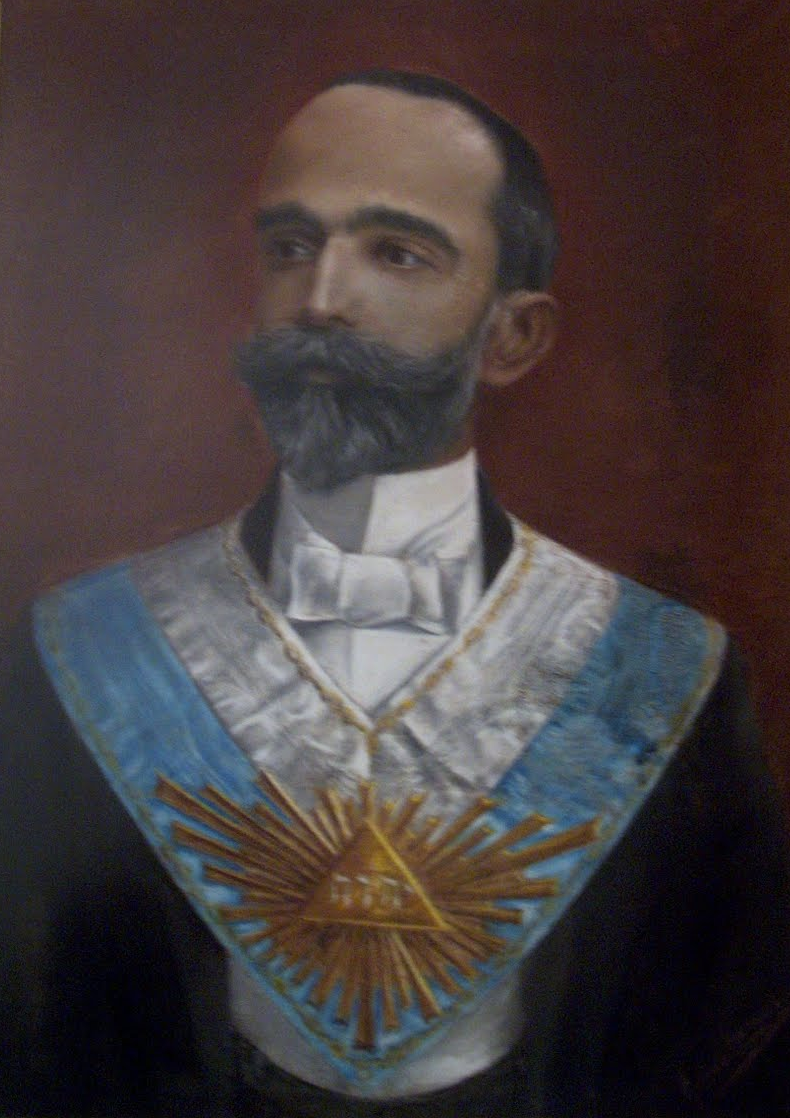 Retrato de Bernardino Machado, enquanto Grão-Mestre (1895-1899) do Grande Oriente Lusitano Unido.